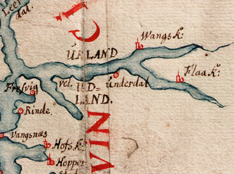 Sjøkart fra 1610 over kysten fra Karmøy til Geirangerfjorden. Håndtegnet i ukjent målestokk. Original kartstørrelse ca 74 cm x 31 cm. Et eksemplar befinner seg hos Statens kartverk Sjø i Stavanger.